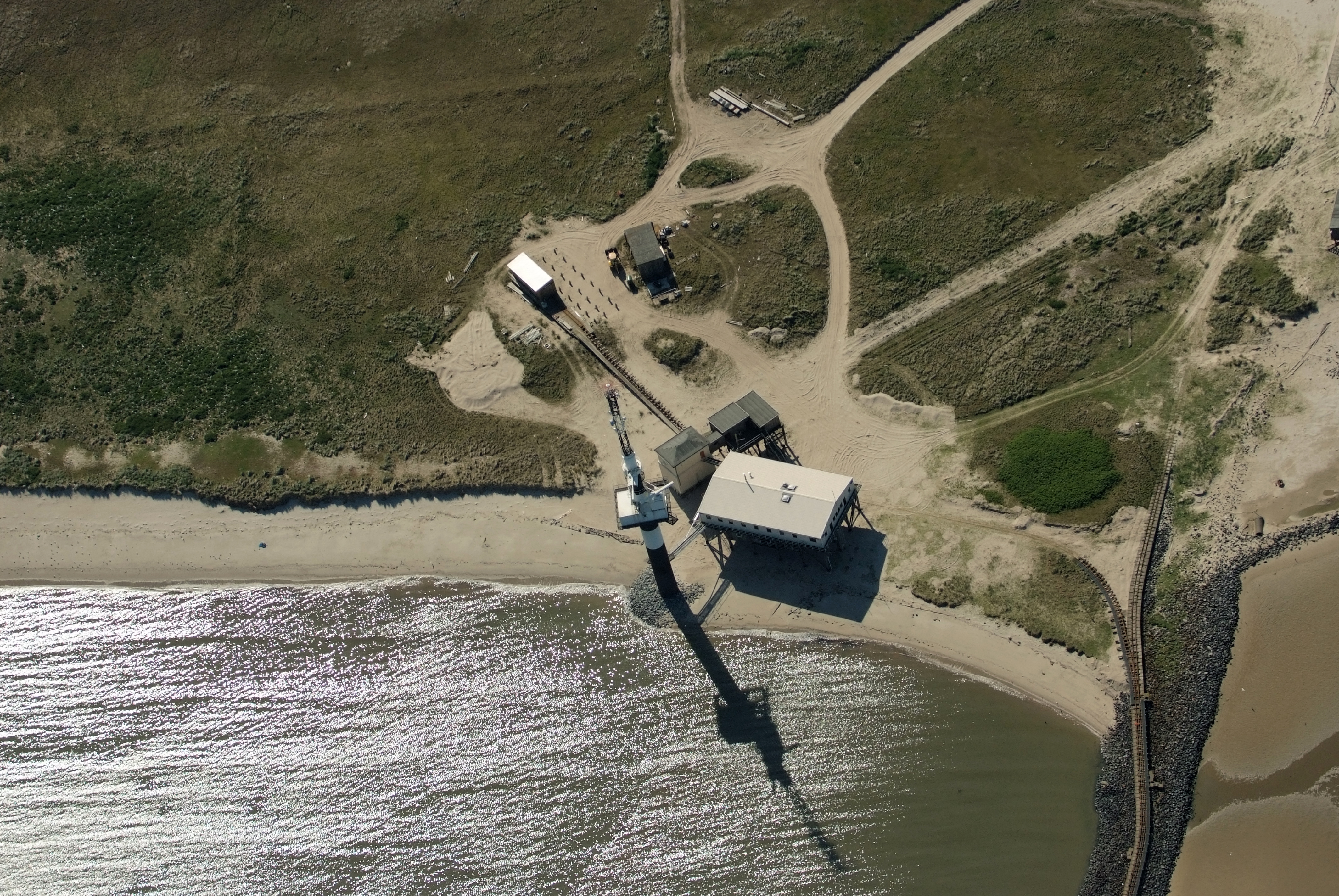 Minsener Oog: Pfahlbauten als Mannschaftsbereich für die Mitarbeiter des Wasser- und Schifffahrtsamts Wilhelmshaven, daneben der 1976 gebaute Radarturm Fotoflug vom Flugplatz Nordholz-Spieka über Bremerhaven, Wilhelmshaven und die Ostfriesischen Inseln bis Borkum Wangerooge